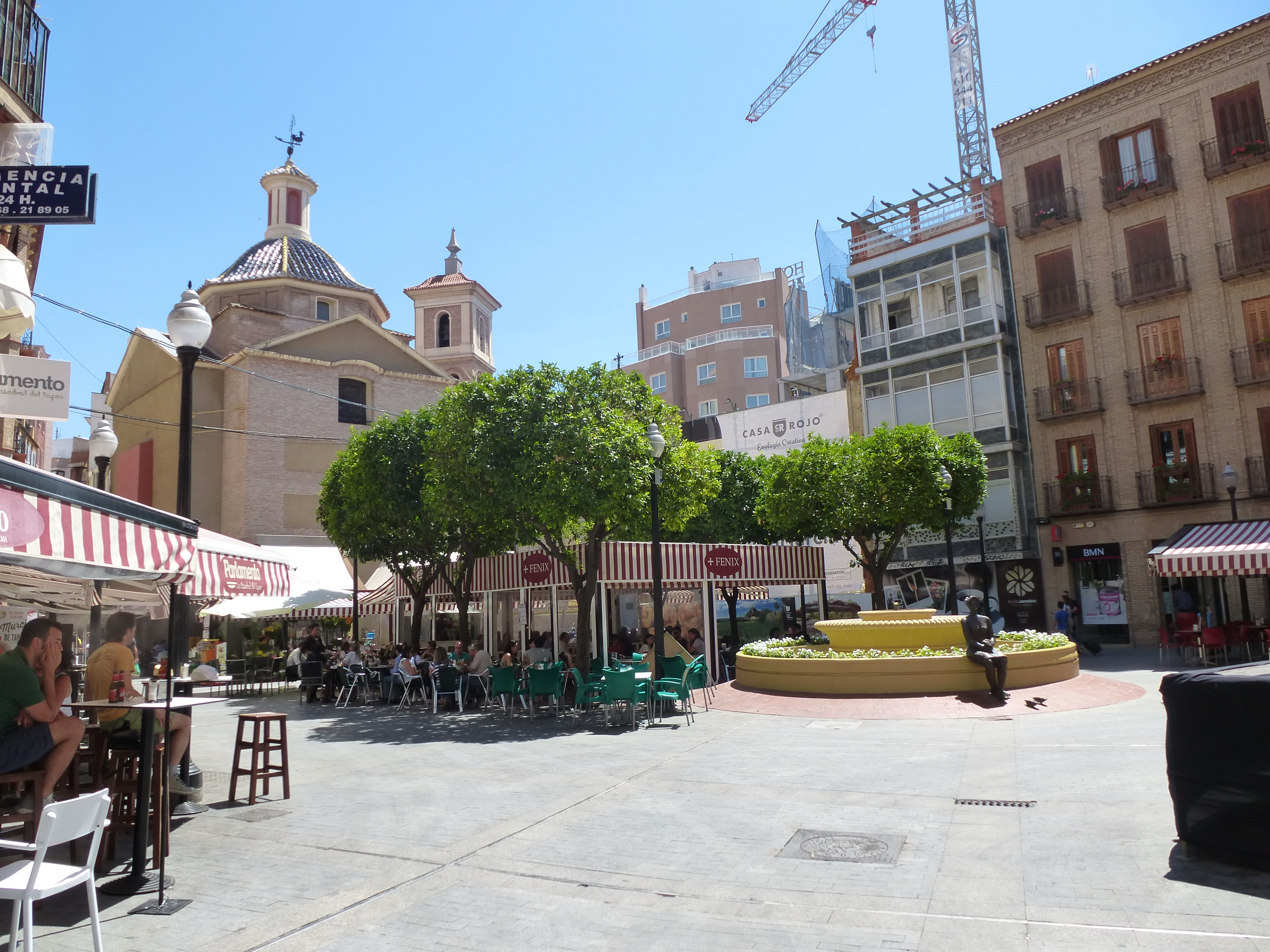 plaza flores